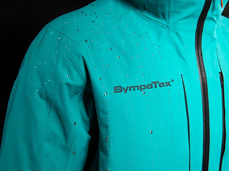 Sympatex Jacke